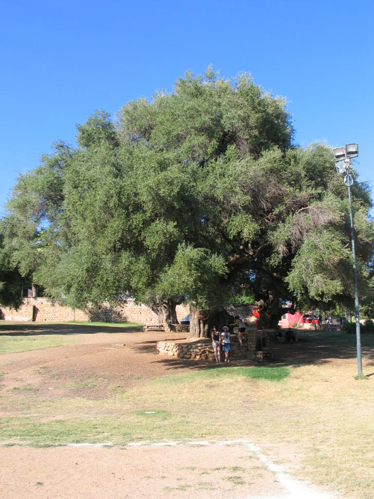 Santa Maria Nafarroakoa elizaren inguruan mila urteko olibondoa.